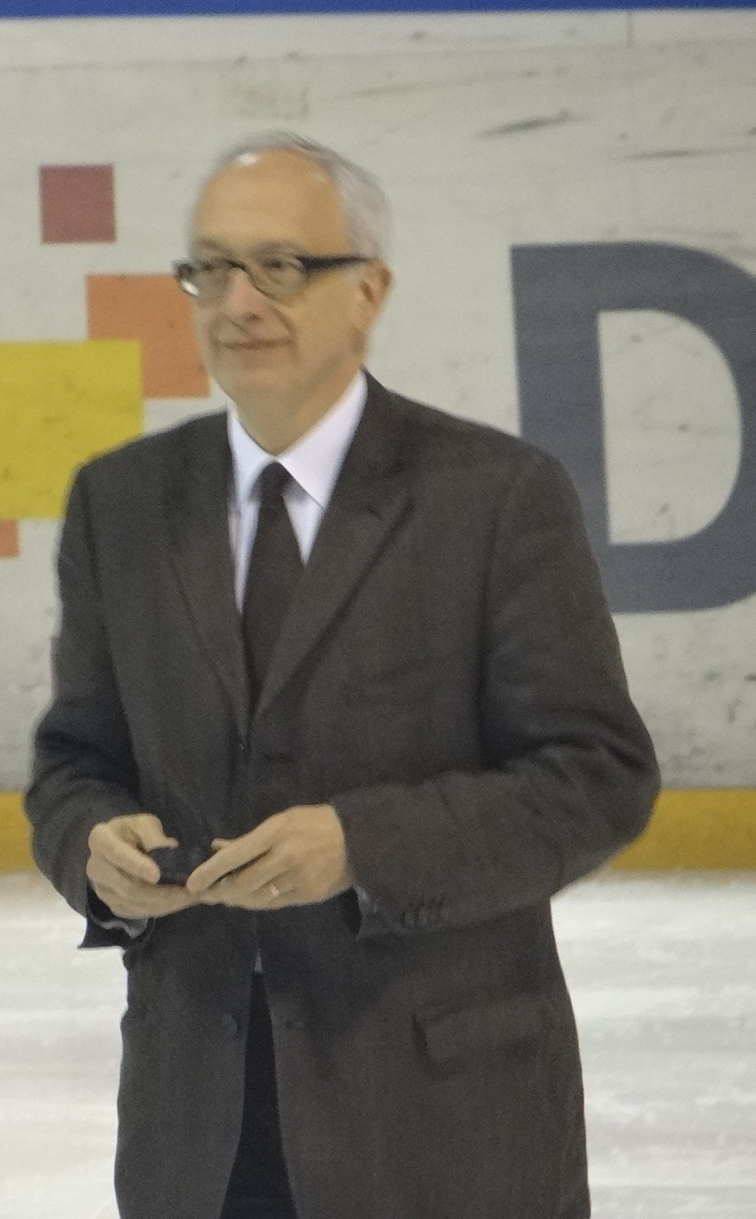 Yvon Robert lors d'un match de hockey à Rouen le 29 mars 2013